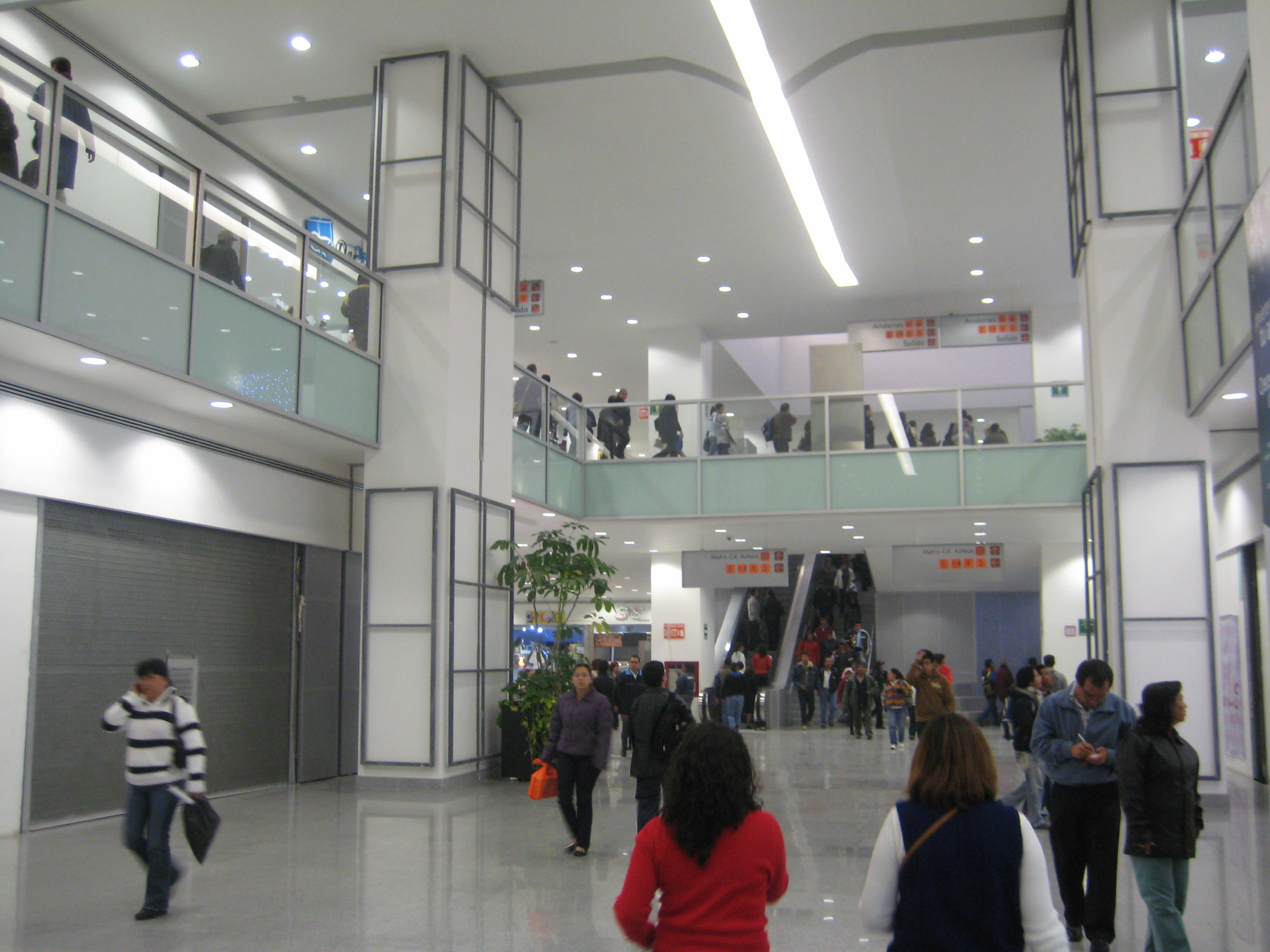 Interior del Mexipuerto Ciudad Azteca